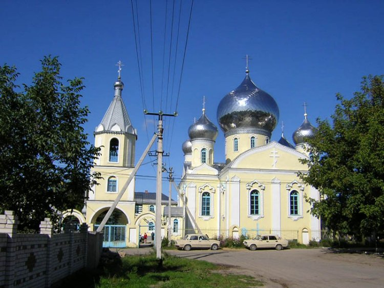 Кодыма Церковь Воздвижения Креста Господня